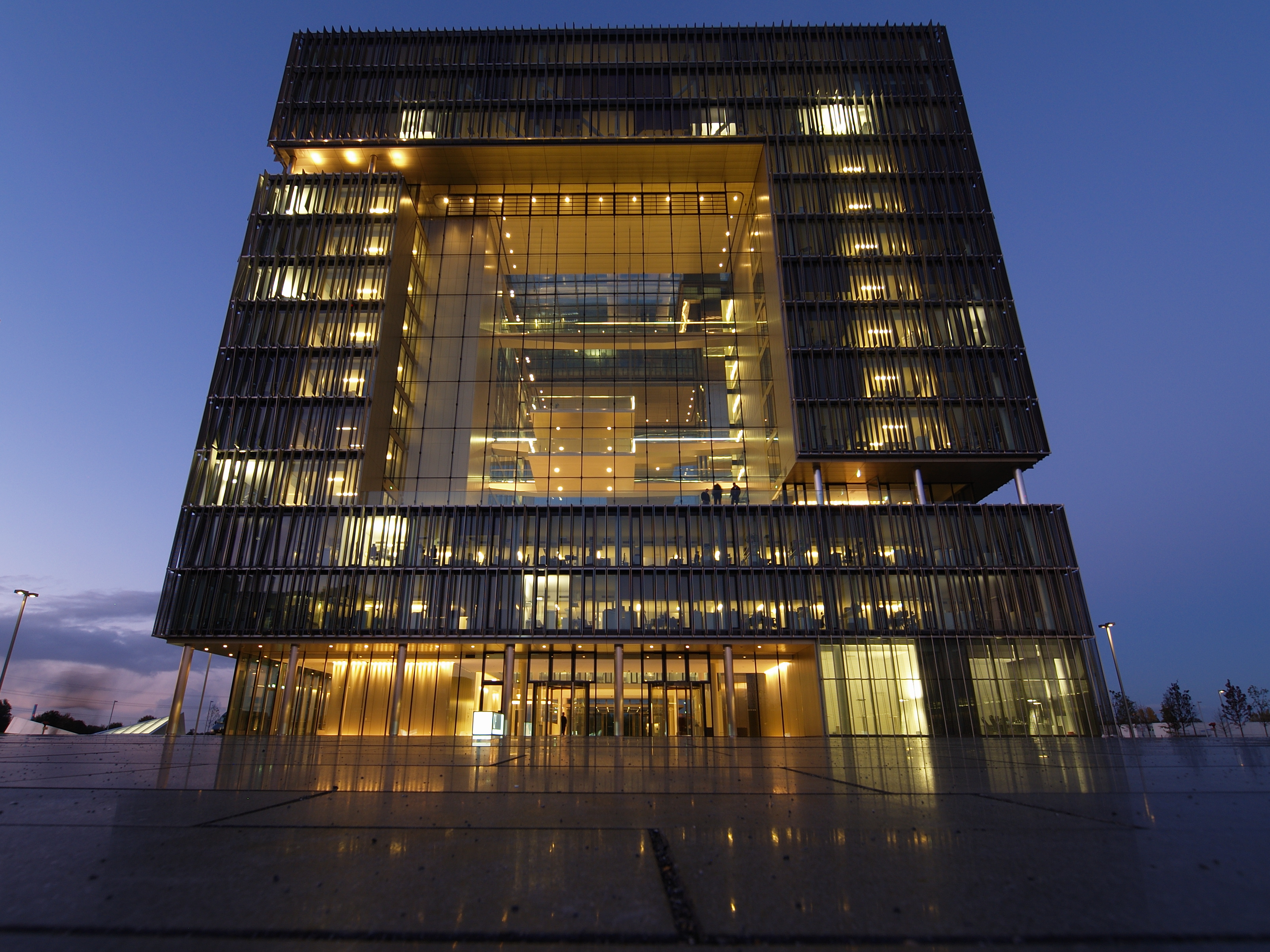 Die neue Konzernzentrale von ThyssenKrupp, Gebäude Q1, im Krupp-Gürtel in Essen